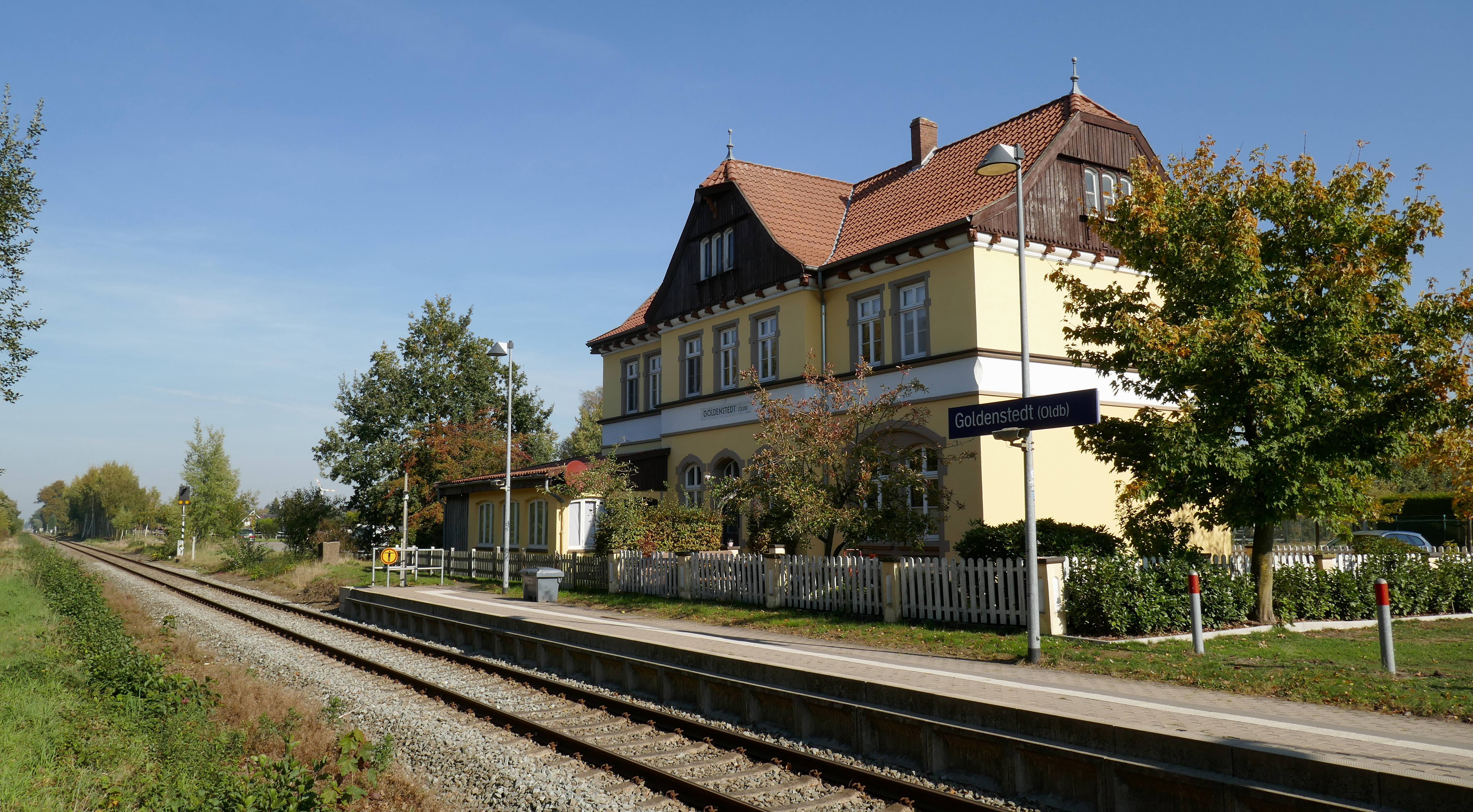 Bahnhof Goldenstedt mit ehemaligem Empfangsgebäude, Landkreis Vechta